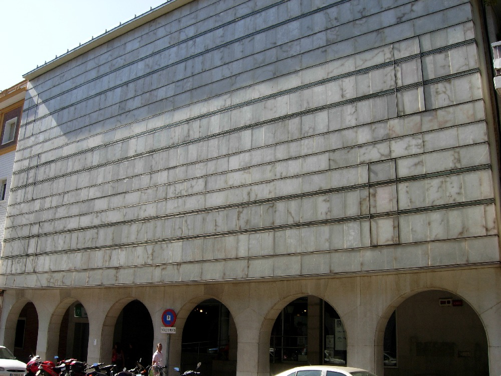 Fachada exterior de la Biblioteca Pública del Estado - Biblioteca Provincial de Huelva